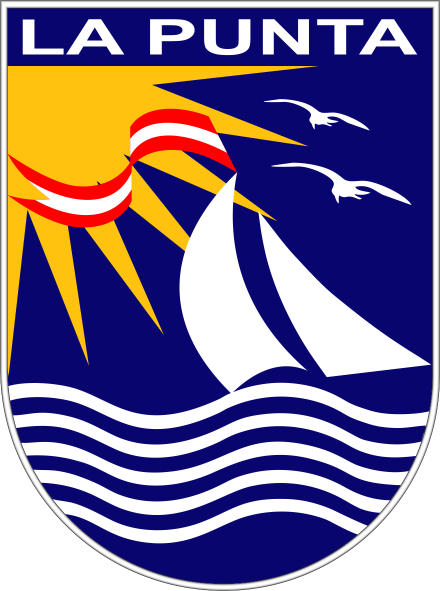 Distrito de La Punta - Provincia del Callao